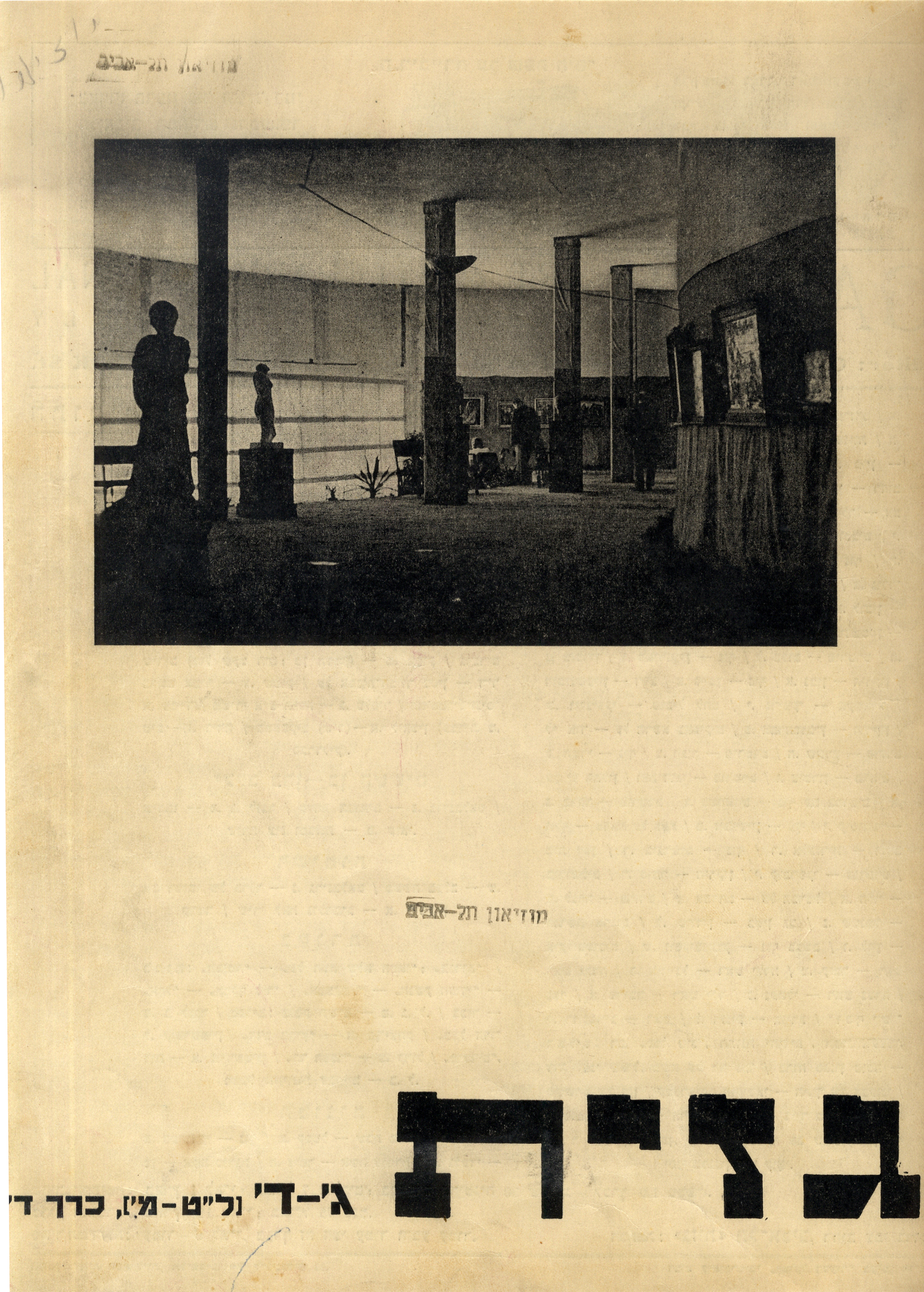 שער גליון כתב העת "גזית", כרך ד', סיוון תמוז תשמ"א, 1940